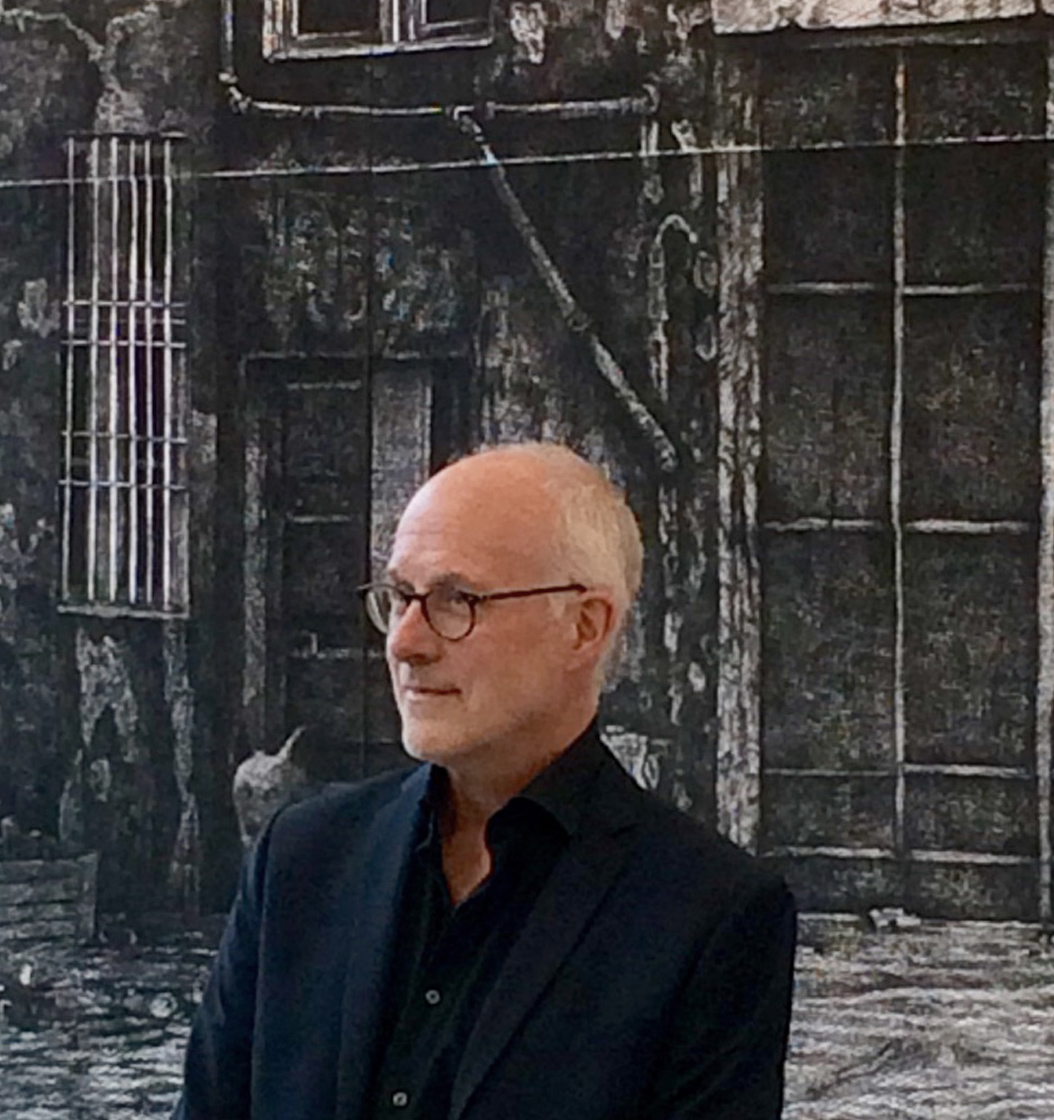 Mikael Kihlman porträtt